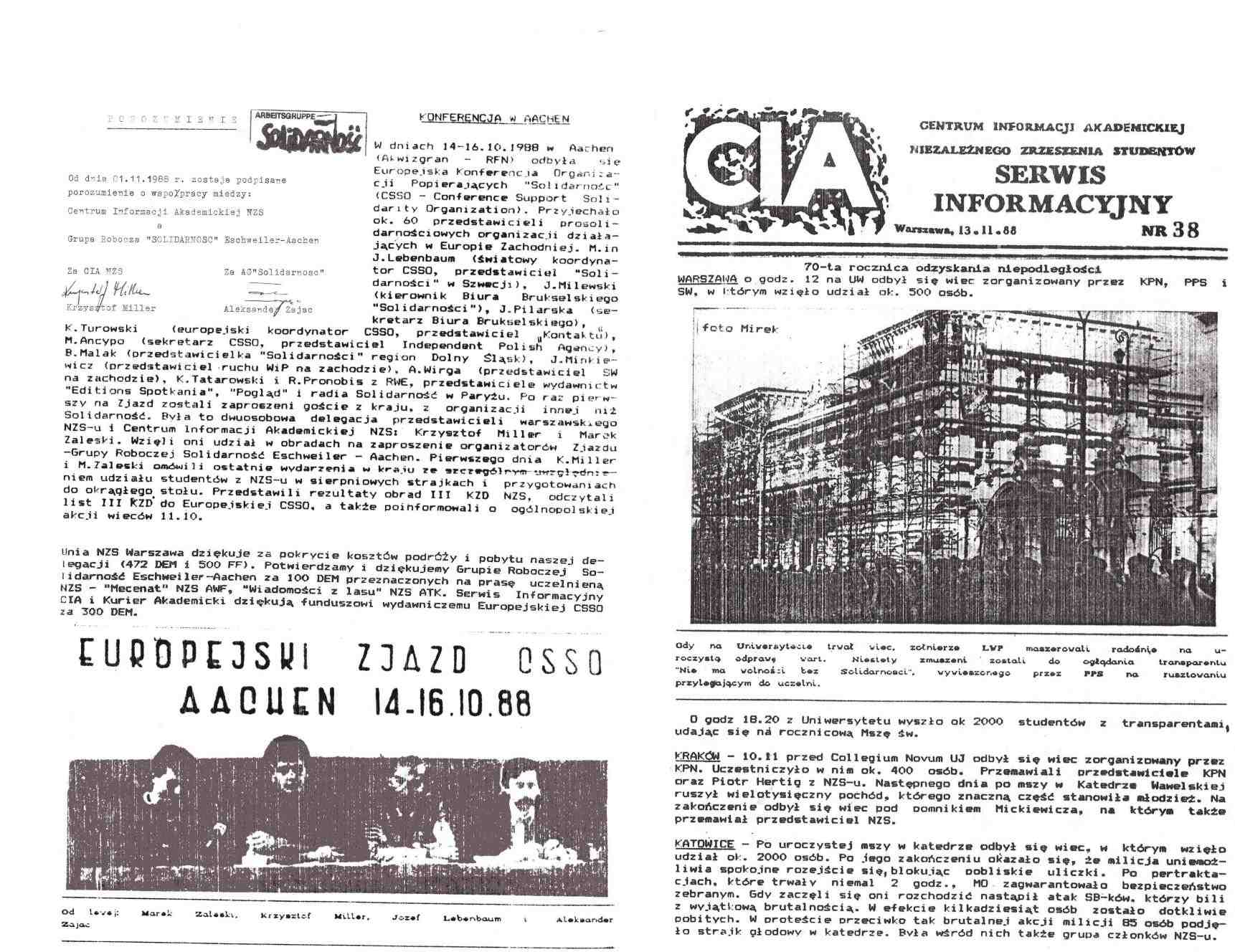 CIA NZS o konferencji CSSO w Aachen, umowa o współpracy